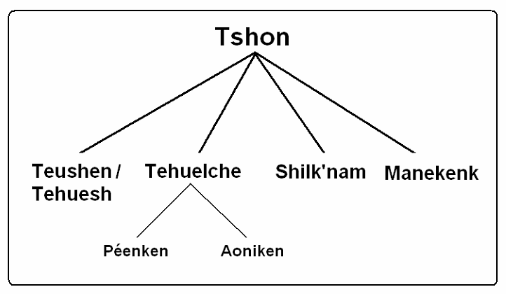 Clasificación de las lenguas tshon (lenguas chon) según Roberto Lehmann-Nitsche. 1970. "El grupo lingüístico tshon de los territorios magallánicos".